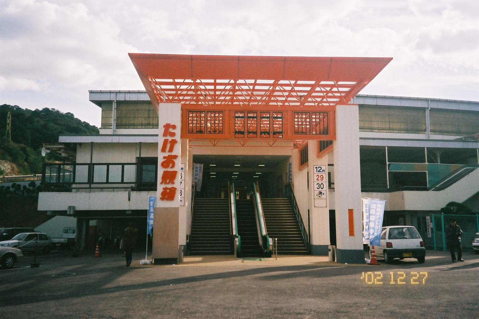 武雄競輪場の入口。